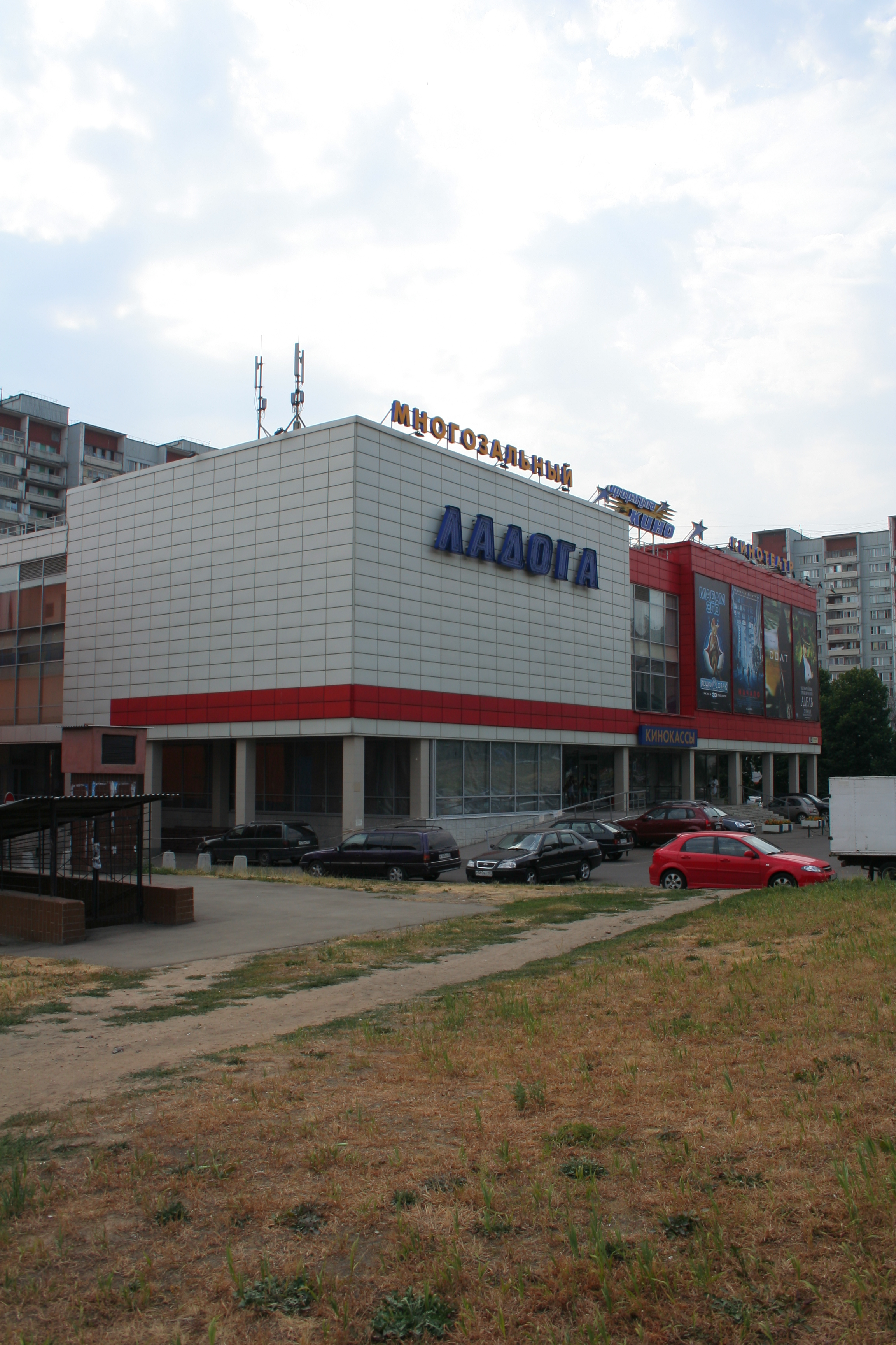 Kinotheater „Ladoga“. Schirokaja Straße 12, Stadtteil Nord-Medwedkowo, Moskau.